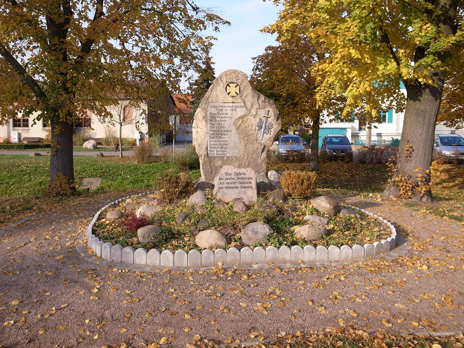 Schierau, Gefallenendenkmal (Kriegerstein)